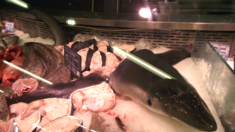 Prionace glauca in a supermarket